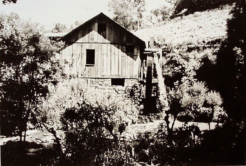 Um dos primeiros moinhos de Caxias do Sul, no distrito de São Romédio, pertencente a Giacomo Clamer, Giovanni Battista Longhi e Giustina Brustolin.